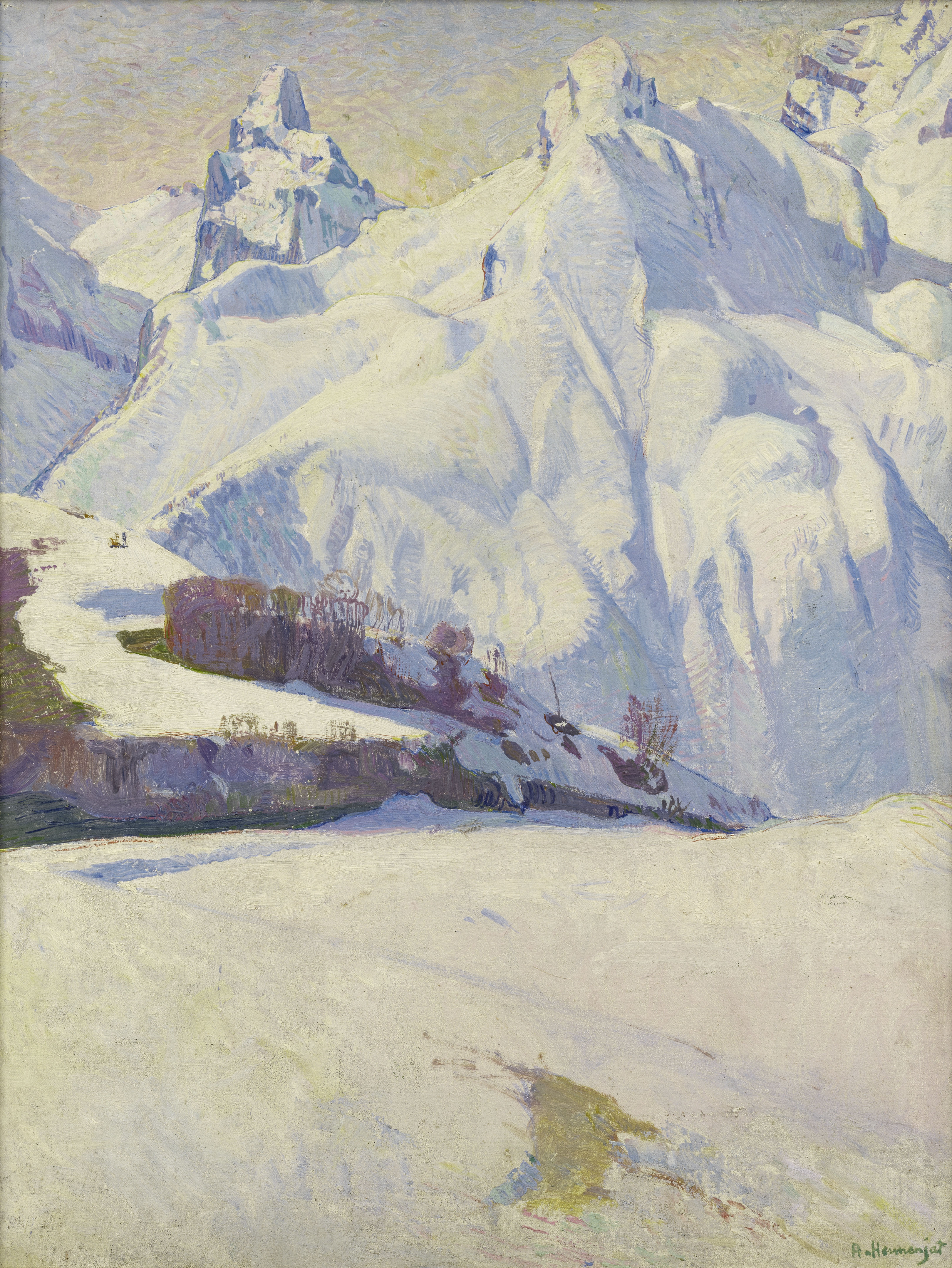 Abraham Hermanjat, Le petit Muveran, sans date [entre 1896 et 1900], huile sur carton, 64 x 49 cm. Nyon, Fondation Abraham Hermanjat.